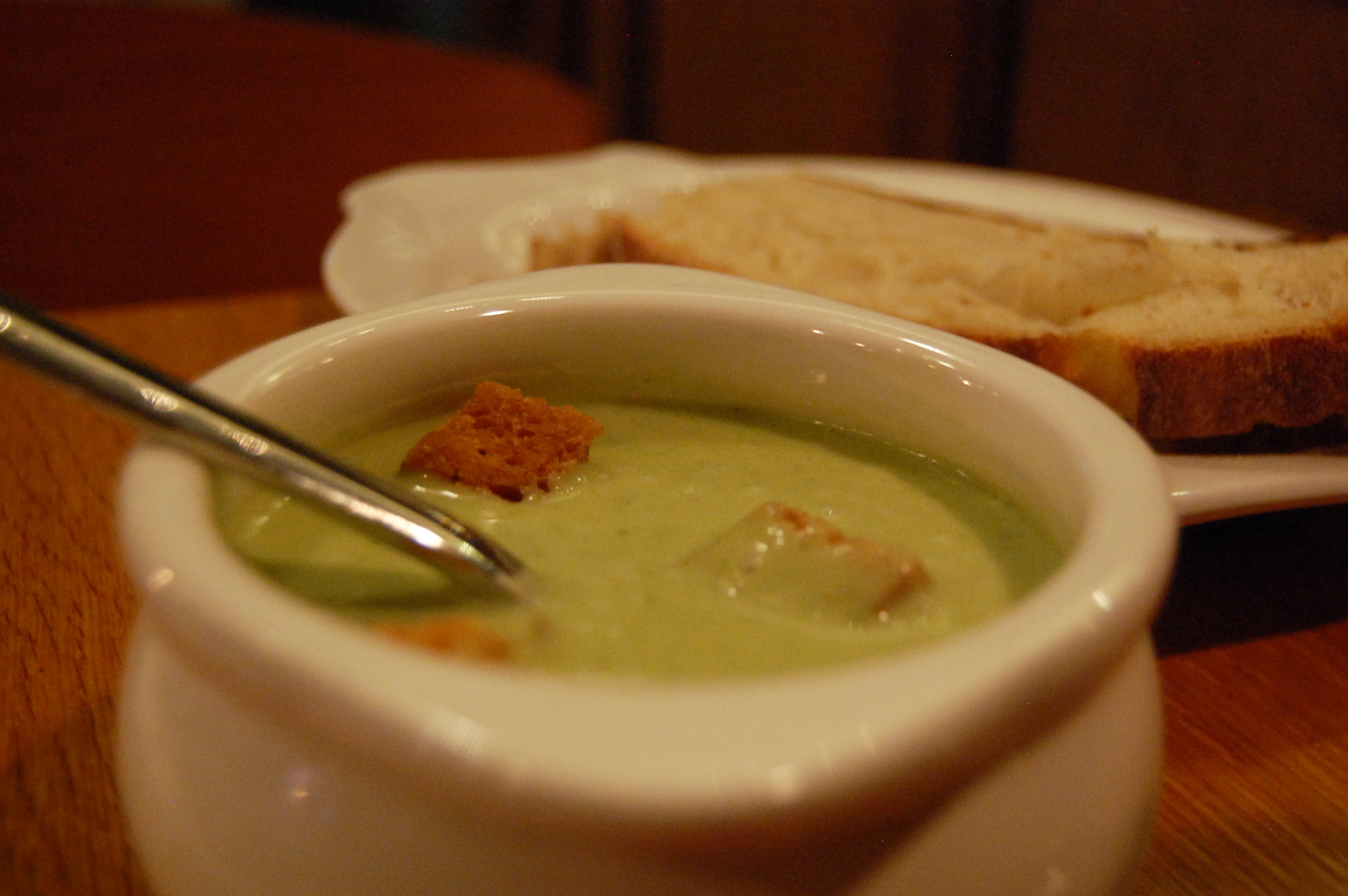 Butter lettuce soup